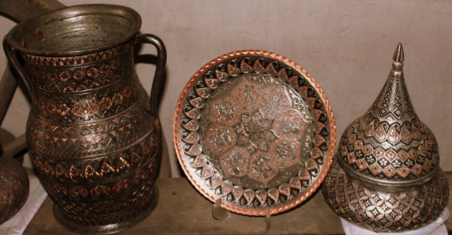 Село Лагич, Исмаиллинского района Азербайджана.